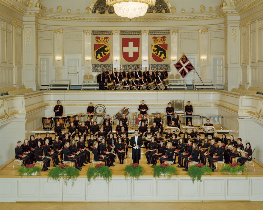 Das Corps der Knabenmusik Bern im Dezember 2006